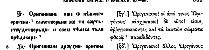 Оригенисты в книге Бенешевич В. Н. Древнеславянская кормчая XIV титулов без толкования. СПб, 1907. Т. 1.